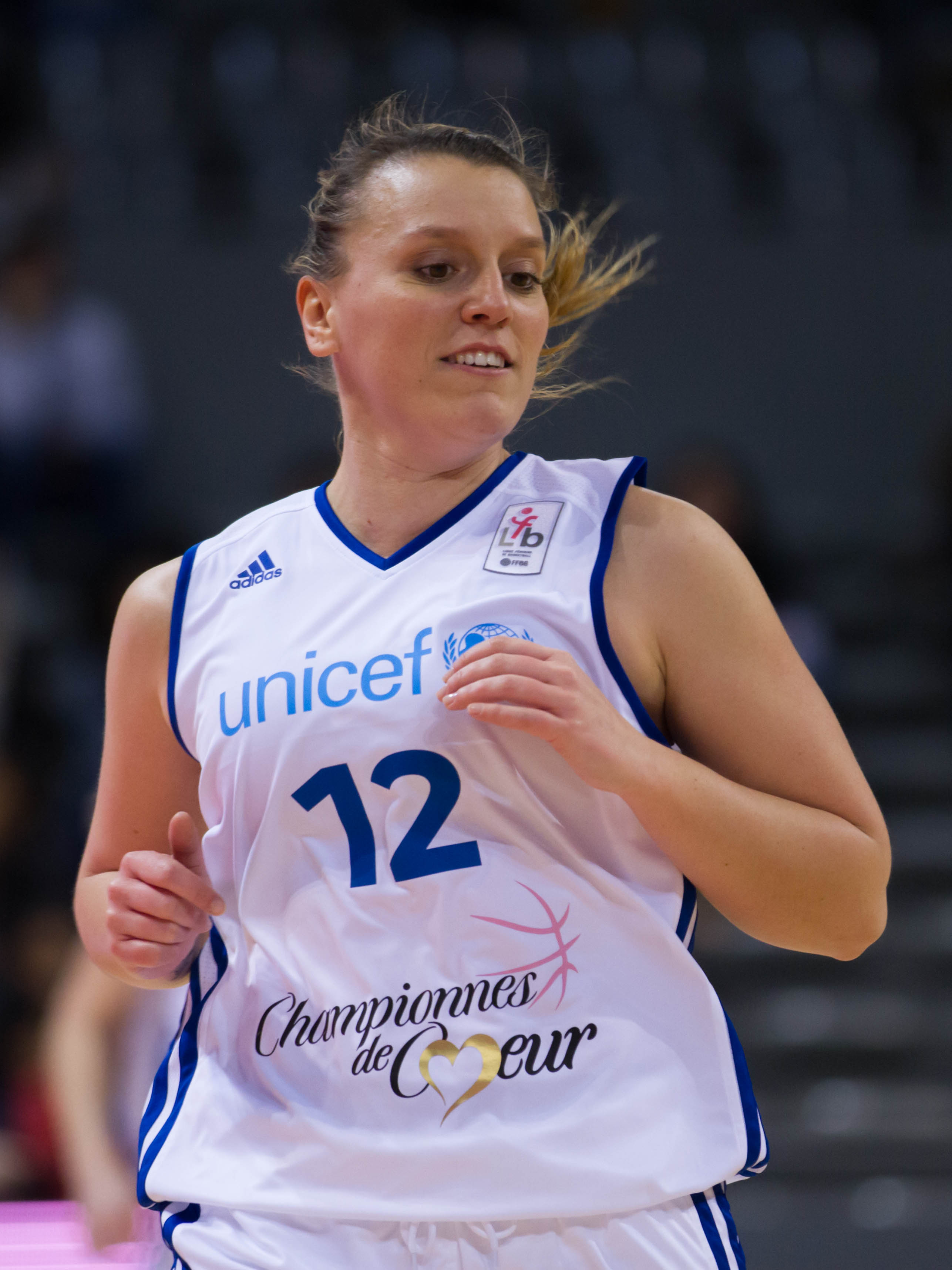 Marion Laborde, match de gala championnes de cœur